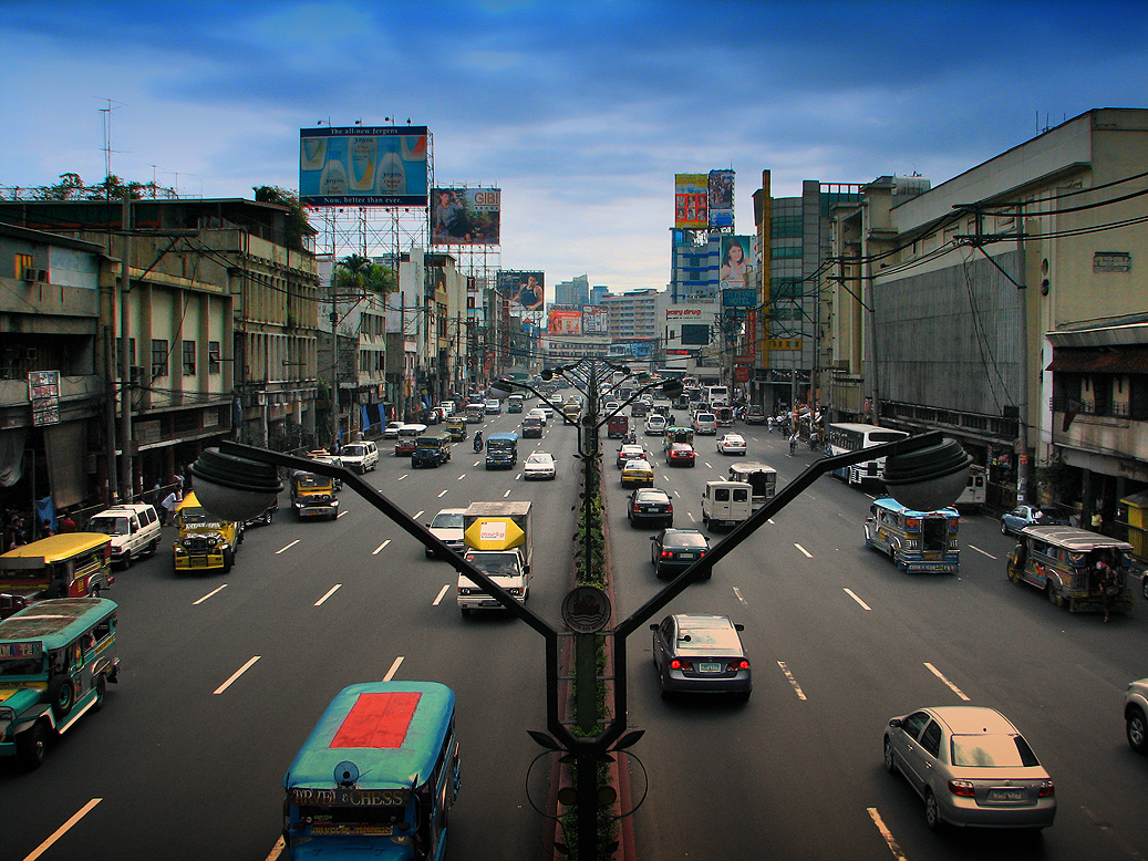 Quezon Blvd., near Quiapo Church